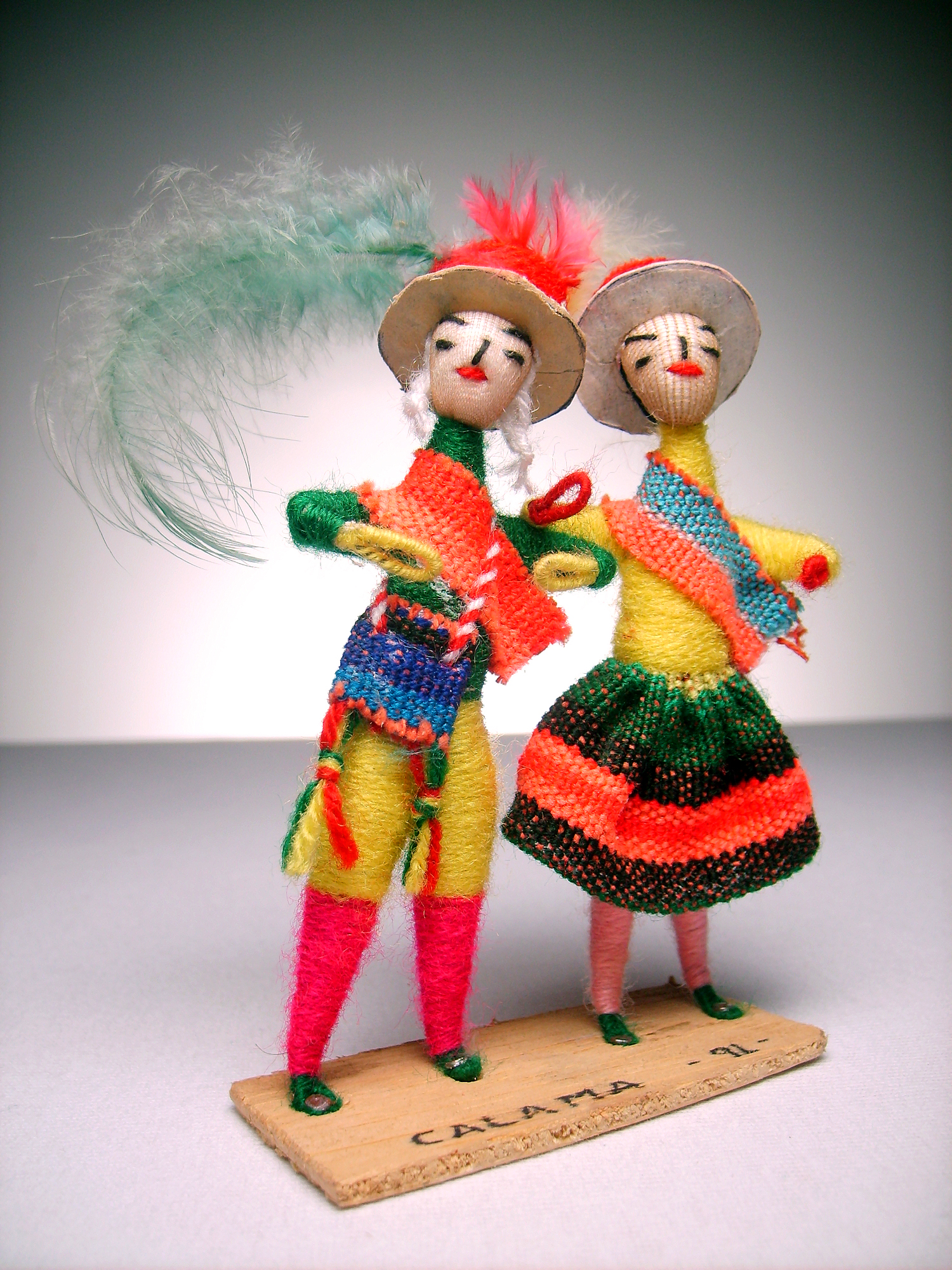 Artesanía de la ciudad de Calama, en el norte de Chile. La figurilla representa a una pareja con los trajes típicos de la zona. Está hecho con lana (trajes), cartón (sombreros), alamabre (armazón de los cuerpos), madera (base), algodón (cabeza) y plumas (decoración del sombrero). Data del año 1991.